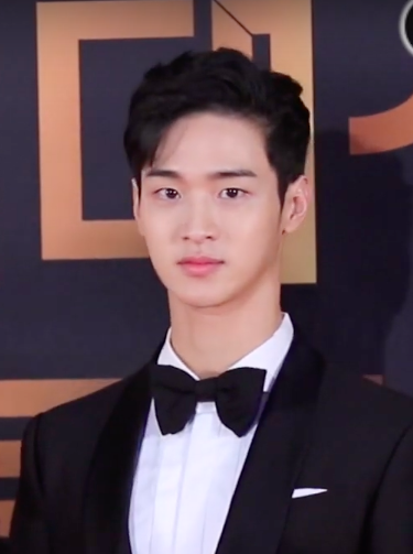 191231 KBS연기대상 장동윤.